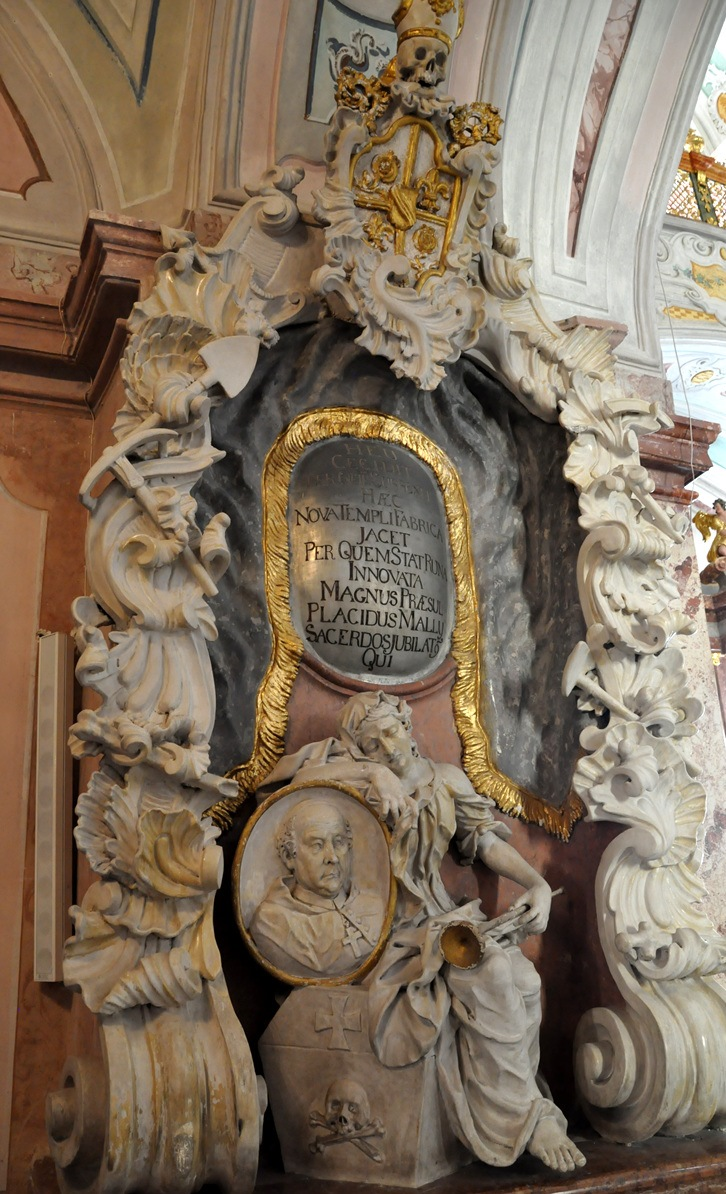 Das Grab von Abt Placidus Mally in der Stiftskirche von Rein